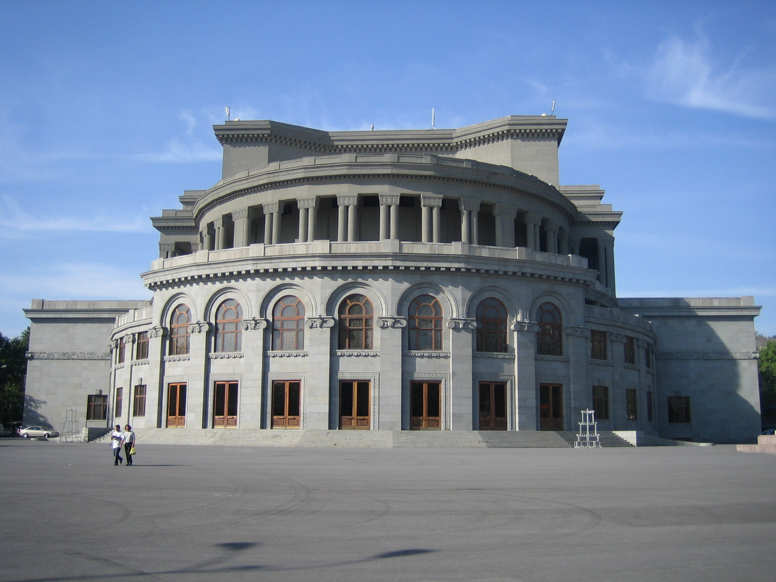 Opera Erevan jour